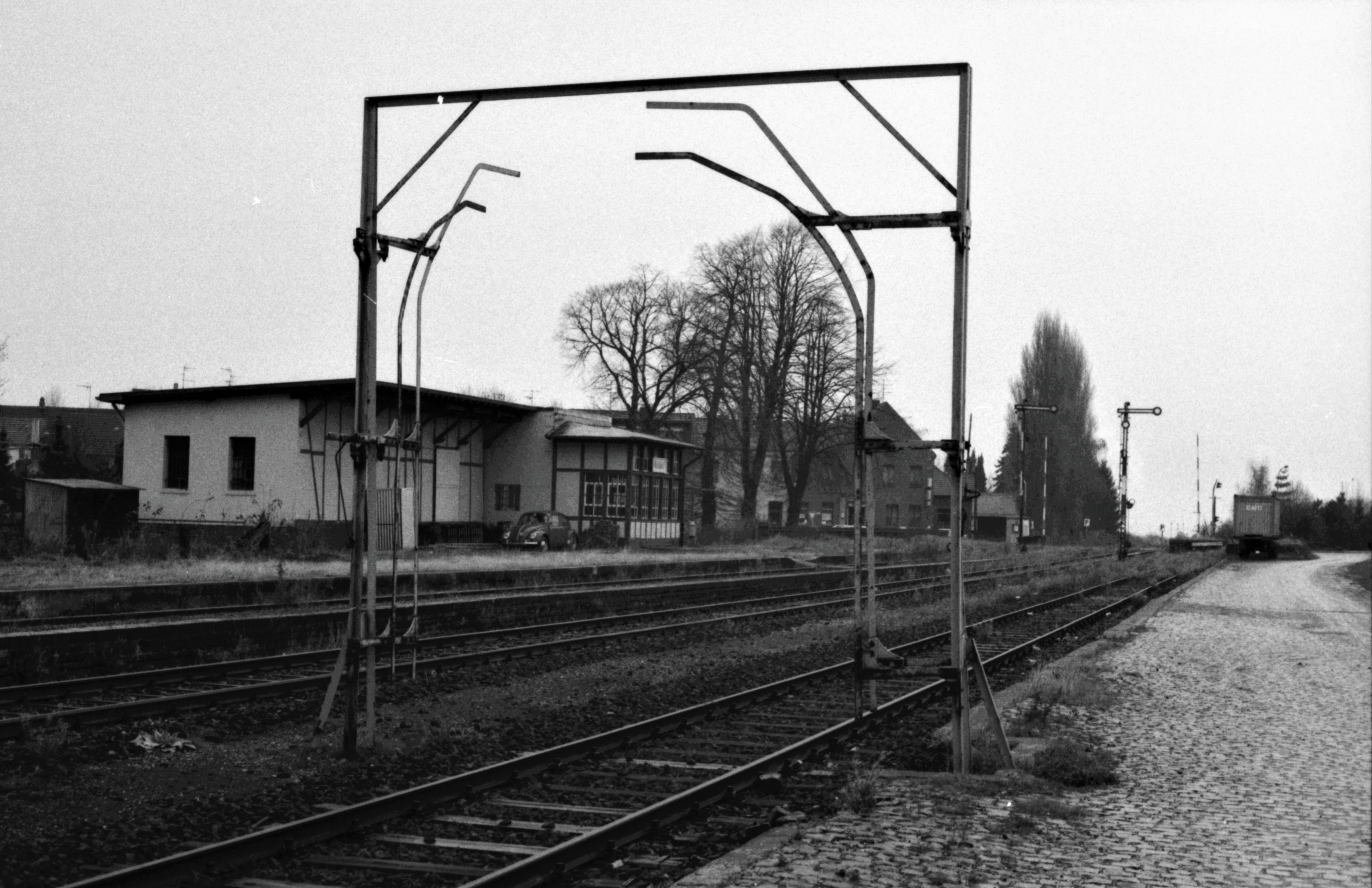 Obwohl der Personenverkehr am 1. Juni 1980 und der Güterverkehr am 15. Juli 1980 eingestellt wurde, befinden sich die gesamten Anlagen in erstaunlich gutem Zustand, auch die Signale (neben bzw. vor dem hohen Baum im Hintergrund) sind noch vorhanden. Man erkennt links das Bahnhofsgebäude, darin links der Güterschuppen und rechts mit Fachwerk das ehemalige Stellwerk. Über letzterem befanden sich noch ein Ober- und ein Dachgeschoss, welche bei einem Brand am 3. August 1975 so stark beschädigt wurden, dass sie abgetragen wurden. Neben dem Gebäude erkennt man zwei Hauptgleise mit Bahnsteigen, was erlaubte, dass sich in Welldorf Züge begegnen konnten. Ganz rechts das Gleis endet an einer Laderampe, rechts neben diesem Gleis verläuft die Ladestraße, von welcher aus man Güterwagen auch von der Seite beladen konnte. Das Bild-beherrschende Gestell im Vordergrund ist ein Lademaß, mit welchem geprüft wurde, ob neu verladene Güter nicht zu weit nach außen ragen. Die Gleise des Bahnhofs Welldorf wurden erst im Sommer 1984 abgerissen.